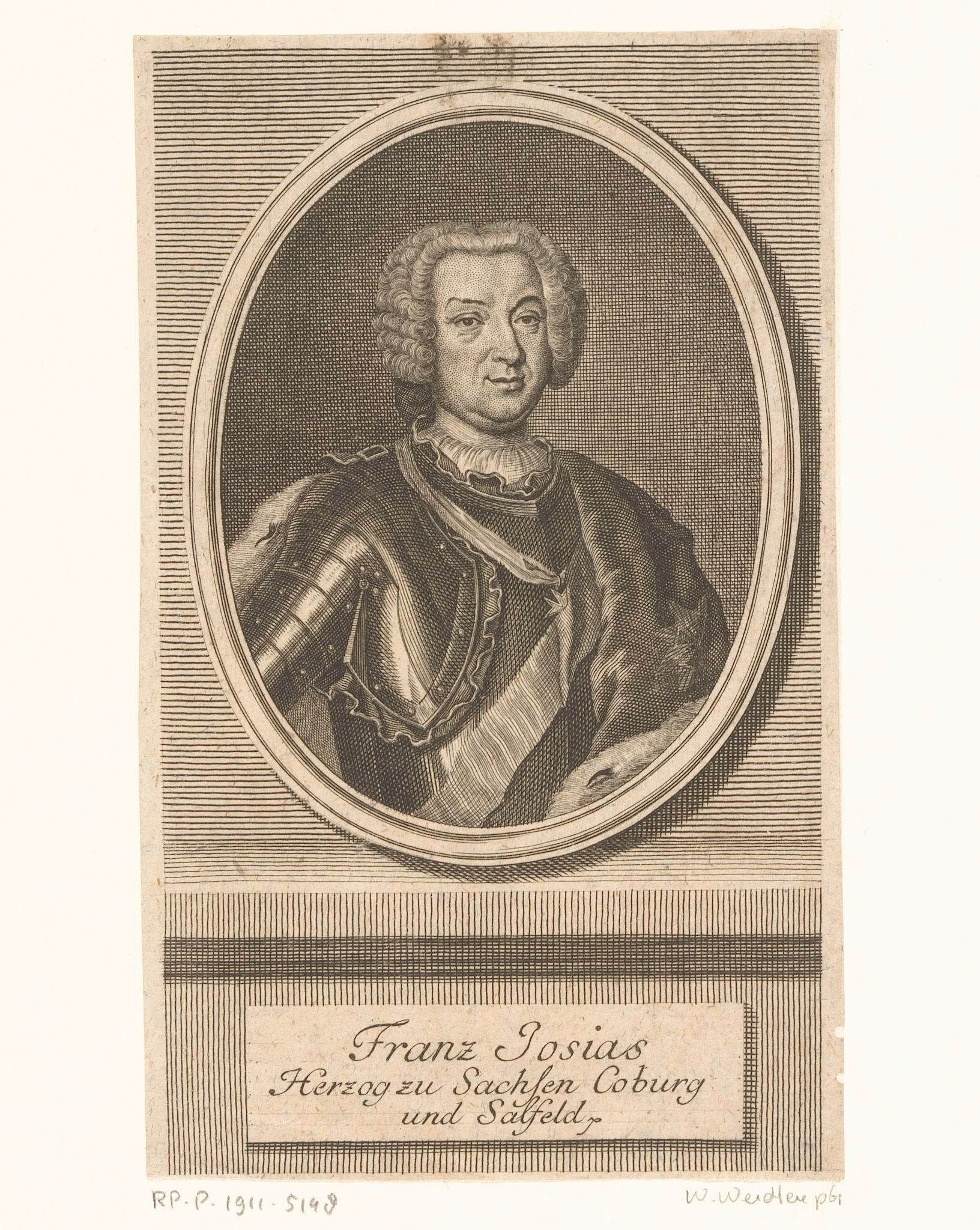 IdentificatieTitel(s): Portret van Franz Josias von Sachsen-Coburg-SaalfeldObjecttype: prent Objectnummer: RP-P-1911-5148Opschriften / Merken: verzamelaarsmerk, verso, gestempeld: Lugt 2228VervaardigingVervaardiger: prentmaker: Johann Martin Bernigerothprentmaker: Martin BernigerothPlaats vervaardiging: LeipzigDatering: 1729 - 1767Fysieke kenmerken: gravure met stippelwerkMateriaal: papier Techniek: graveren (drukprocedé) / stippelwerkAfmetingen: blad: h 152 mm (binnen de plaatrand afgesneden) × b 92 mm (binnen de plaatrand afgesneden)OnderwerpWat: historical personsarmourWie: Franz Josias von Sachsen-Coburg-SaalfeldVerwerving en rechtenVerwerving: aankoop 1905Copyright: Publiek domein